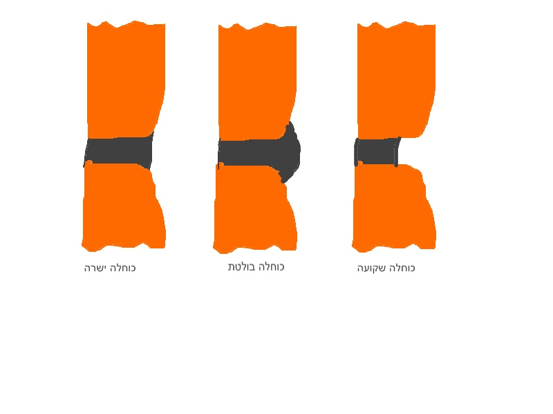 Filling between joints styles _ hebrew